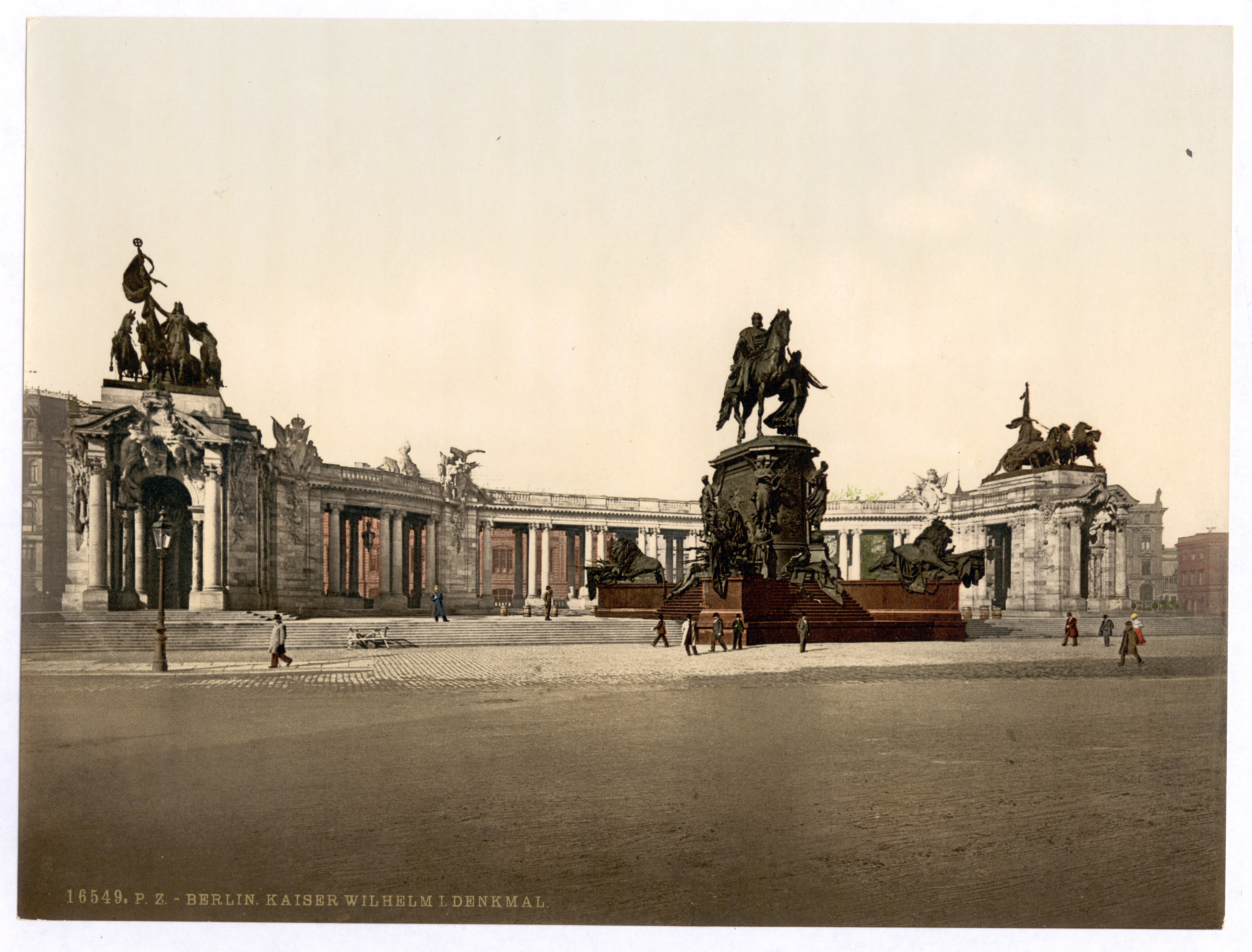 Kaiser-Wilhelm-Nationaldenkmal in Berlin, westlich vor dem Stadtschloss, eingeweiht am 22. März 1897